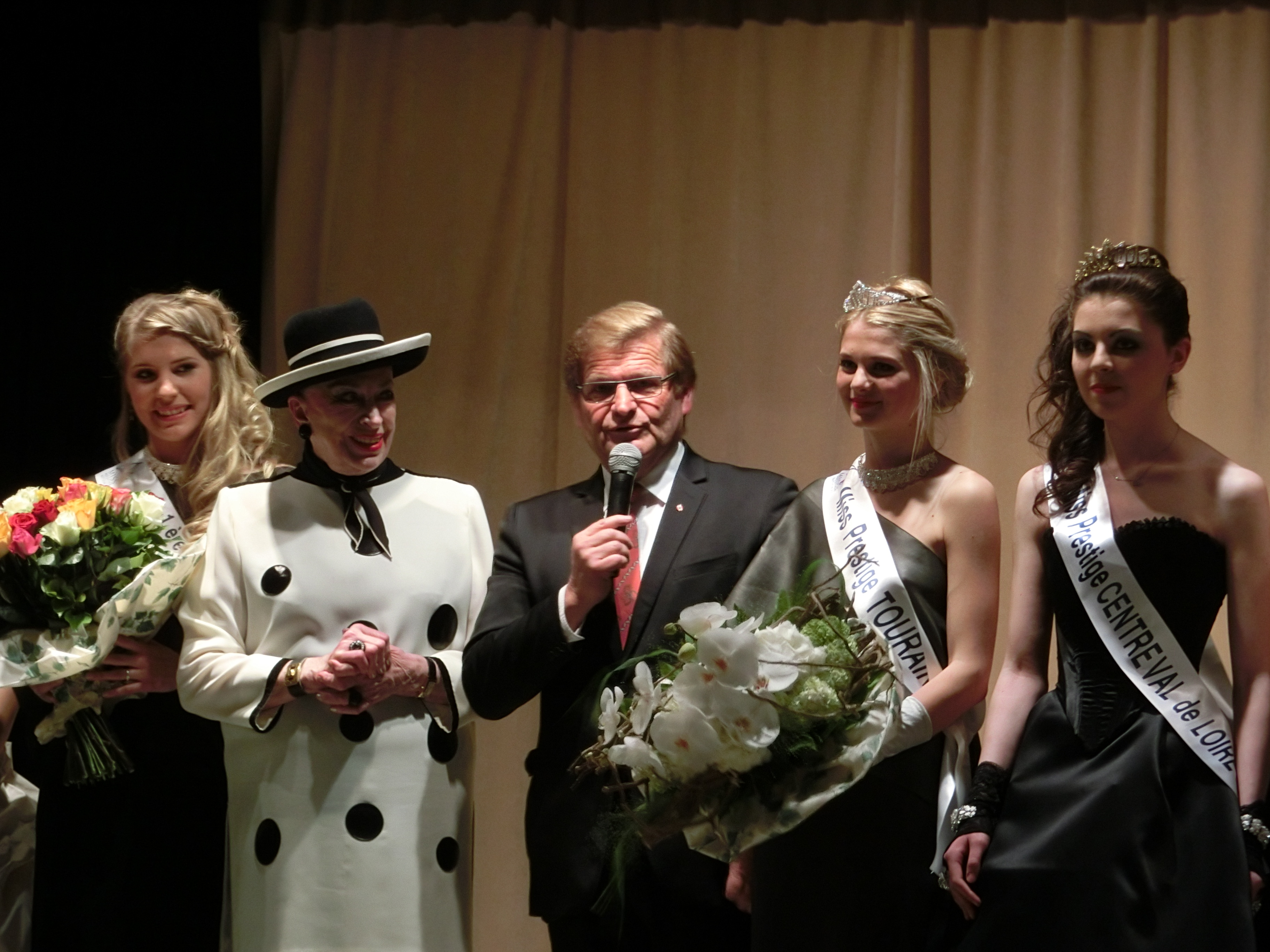 Geneviève de Fontenay à Montrichard le 04 mai 2014.